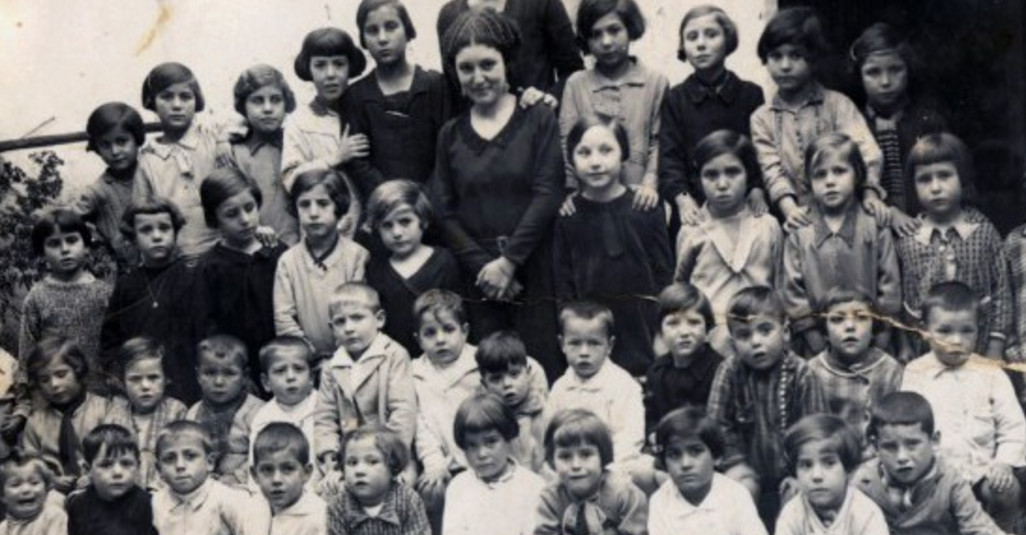 Escuela mixta en la España de los años 1920-1930